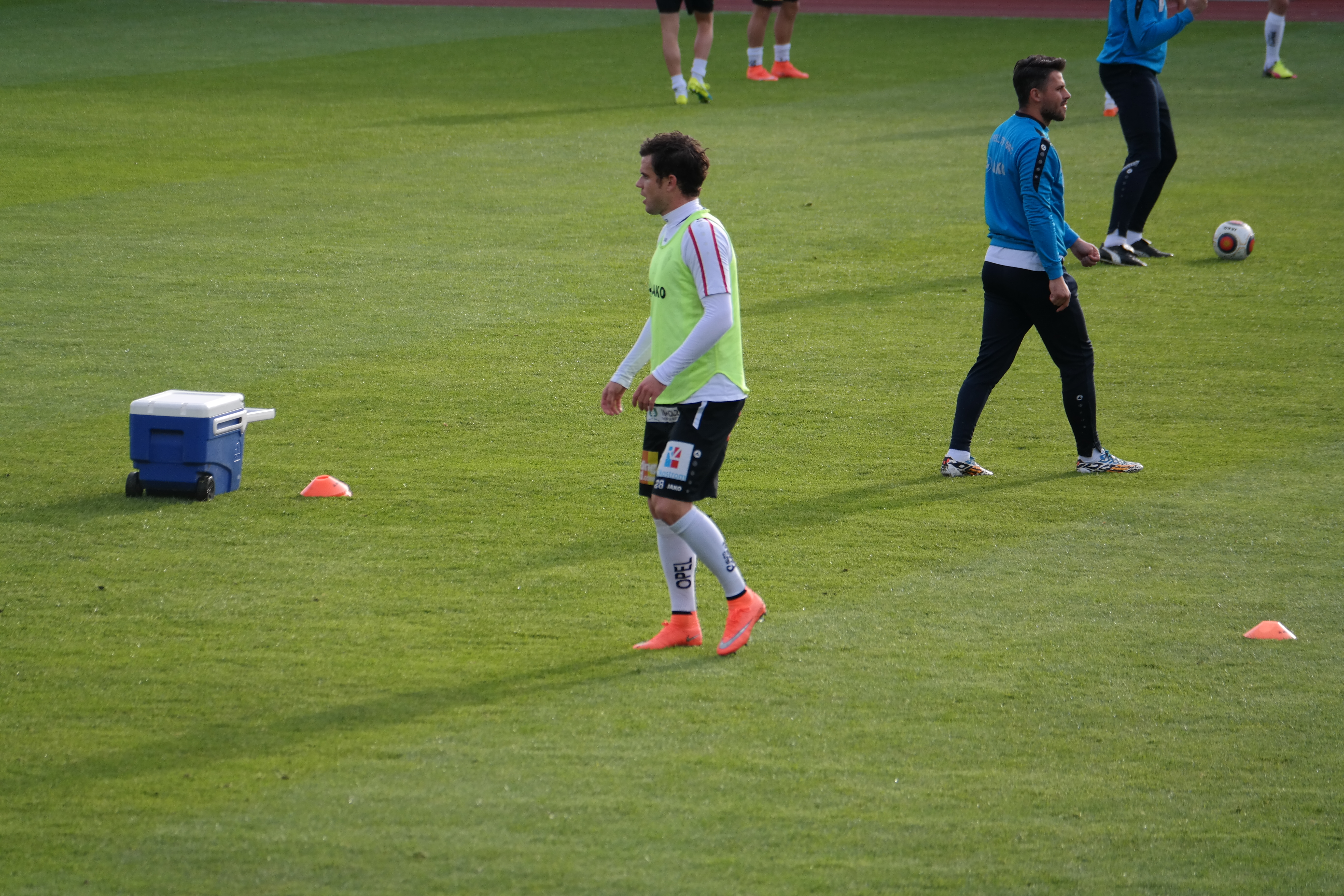 Thomas Zündel